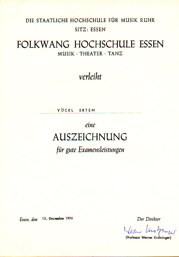 Yücel Erten Arşivinden